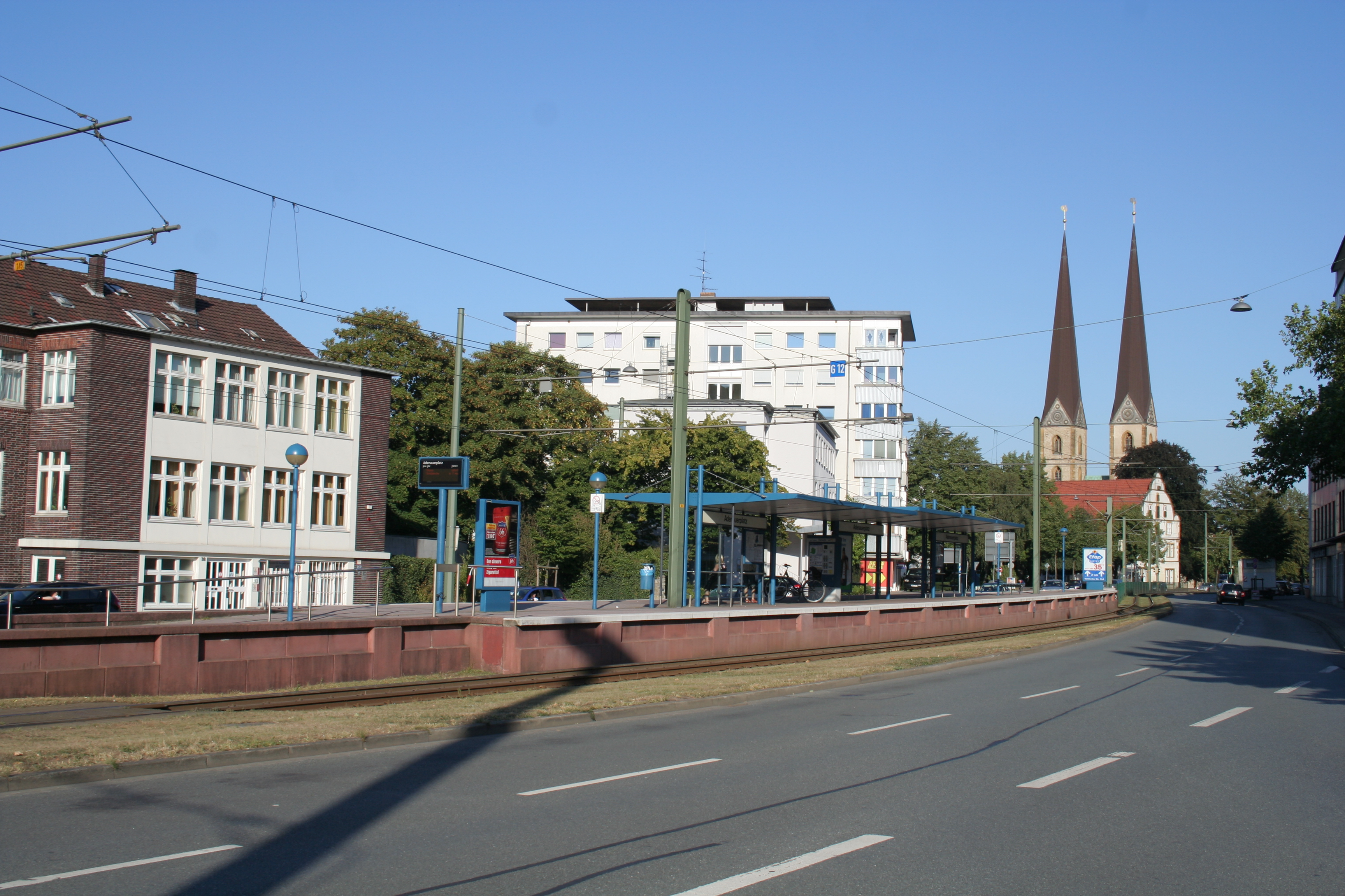 Oberirdische Haltestelle Adenauerplatz der Stadtbahn Bielefeld